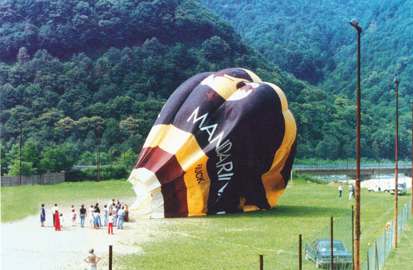 Mongolfiera in sorvolo sull'esposizione con partenza dal campo dell'oratorio